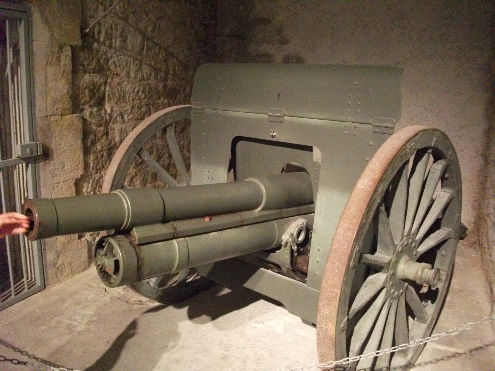 Canon divisionnaire de 76,2 de la brigade russe envoyée en France en 1916 et qui combattit dans la région de Reims. Fabriqué par la «société des usines Poutilov», N°8682, en 1916. Collection du fort de la Pompelle.